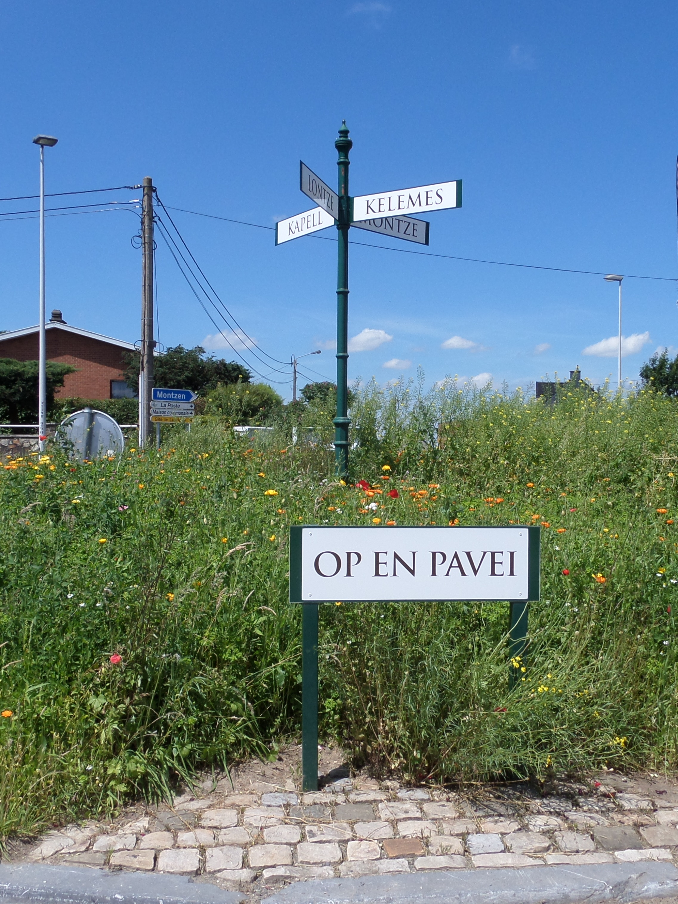 Wegwijzer in het Platdiets langs de Luikse Steenweg (Op en Pavei) in het Belgische gehucht Birken wijzend in de richtingen van Hendrik-Kapelle (Kapell), Kelmis (Kelemes), Lontzen (Lontze) en Montzen (Montze)